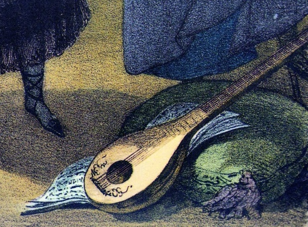 Detalhe da gravura "Costumes de Rio de Janeiro" de Johann Moritz Rugendas (1802-1858).